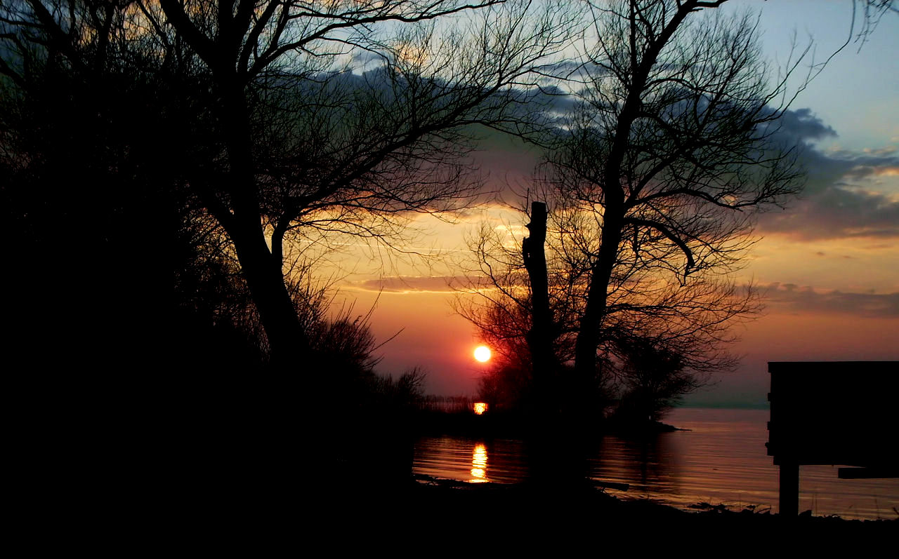 Dieses Bild wurde von mir persönlich bei der Höchster Bodenseebucht in der Nähe des Gasthauses "Glashaus" aufgenommen. Es zeigt den April-Sonnenuntergang in Blickrichtung Gaißau und Höchster Hafen. Die rote Farbe des Himmels ist typisch für diese Jahres- und Uhrzeit im Rheindelta Naturschutzgebiet Ramsar (größtes am Bodensee).